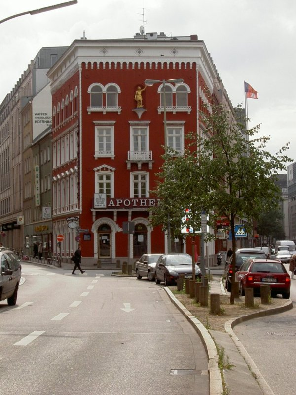 Gebäude am Georgsplatz 16 in Hamburg. Das Haus gilt als typisches Beispiel für die nach dem Hamburger Brand auf den freigewordenen Flächen errichtete Bebauung ("Nachbrandarchitektur"). Viele Beispiele für diese Architektur sind nicht erhalten. Übrigens befand sich zum Zeitpunkt der Aufnahme nicht die Apotheke Niemitz in dem Haus. Das Erdgeschoß war ersichtlich im Zustand der Renovierung. This is a photograph of an architectural monument.